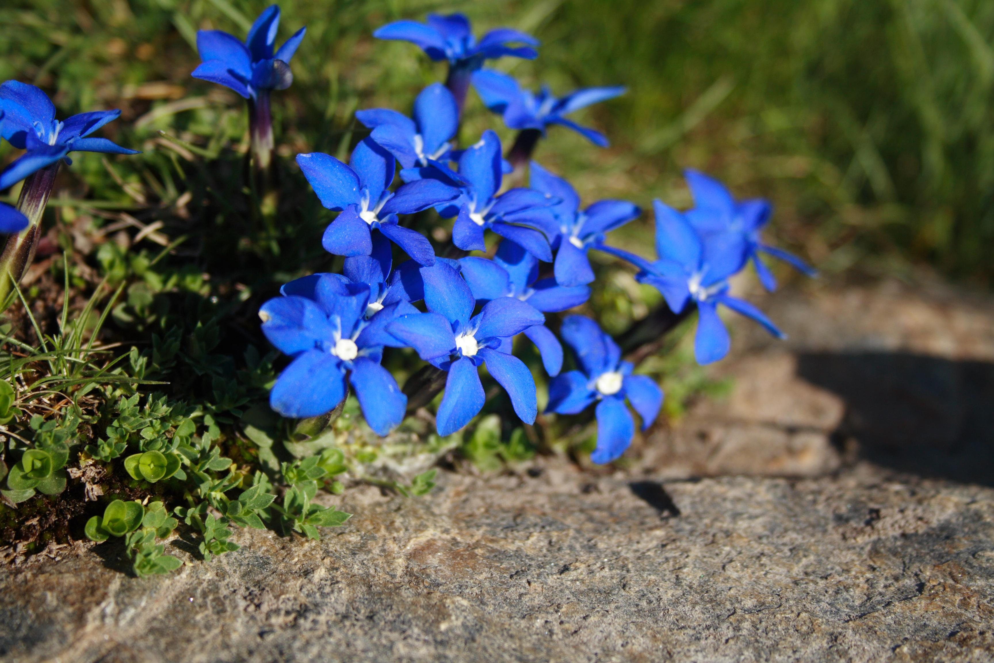 Gentiana sierrae (called Genciana de primavera, found in Sierra Nevada (Spain))